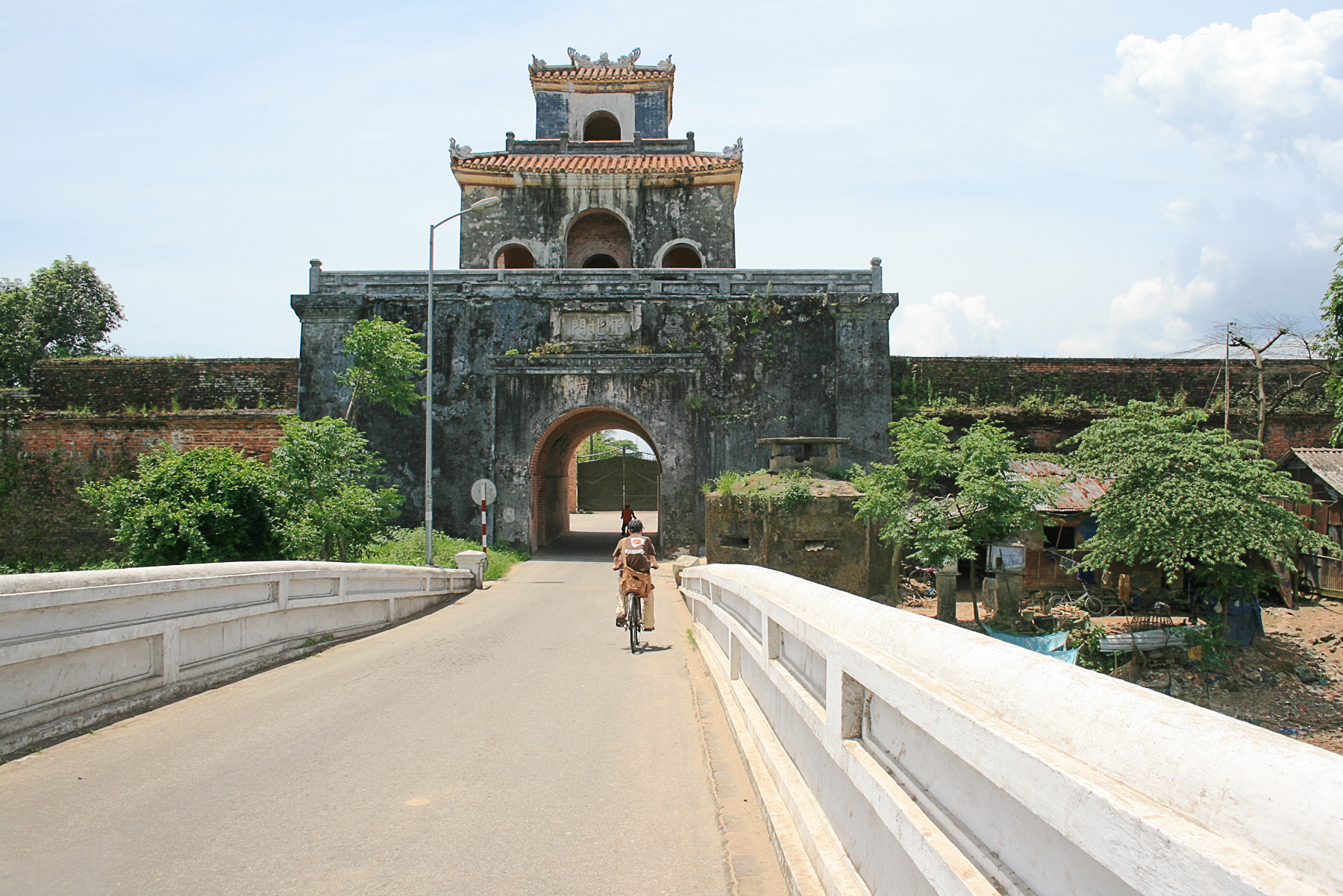 Chánh Bắc Môn (dân gian hay gọi là của Hậu), kinh thành Huế